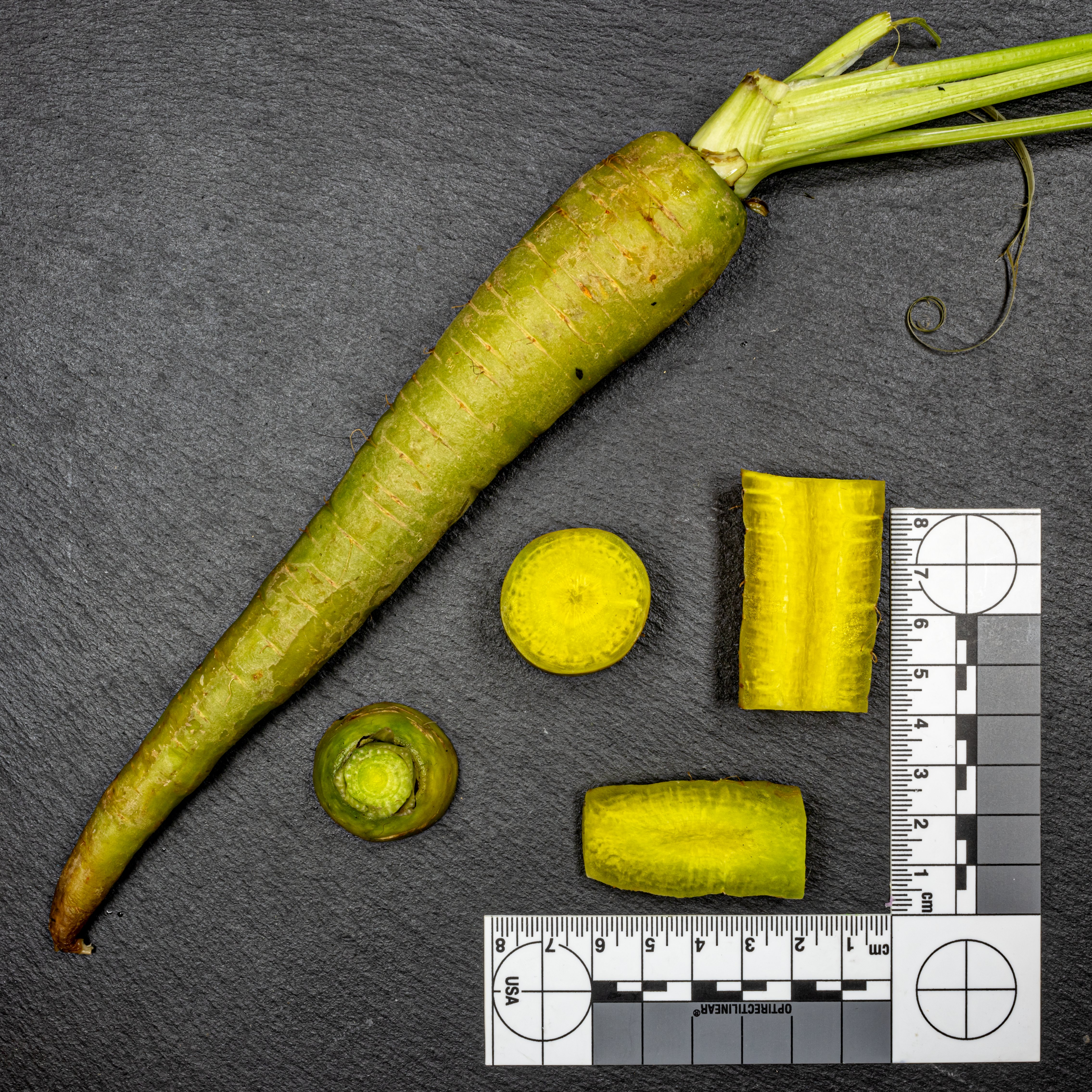 cross section of vegetables